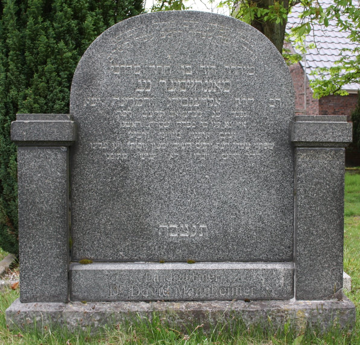 Grabstein des Landrabbiners David Mannheimer auf dem jüdischen Friedhof in Oldenburg (Oldb).